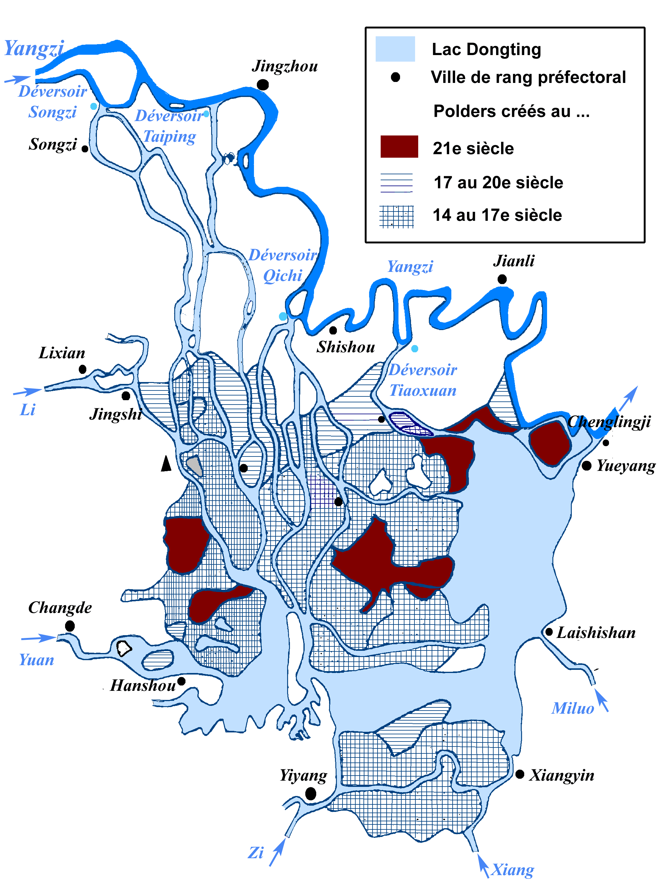 Plan du lac Dongting en Chine et de ses polders (version francisé d'un plan en chinois)